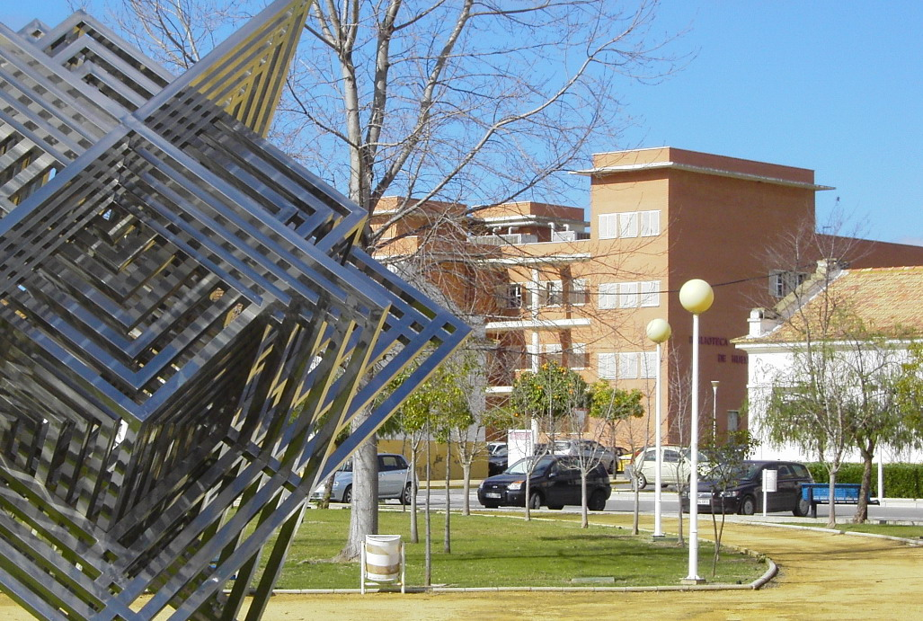 Plaza Central de la Universidad de Huelva, Campus del Carmen